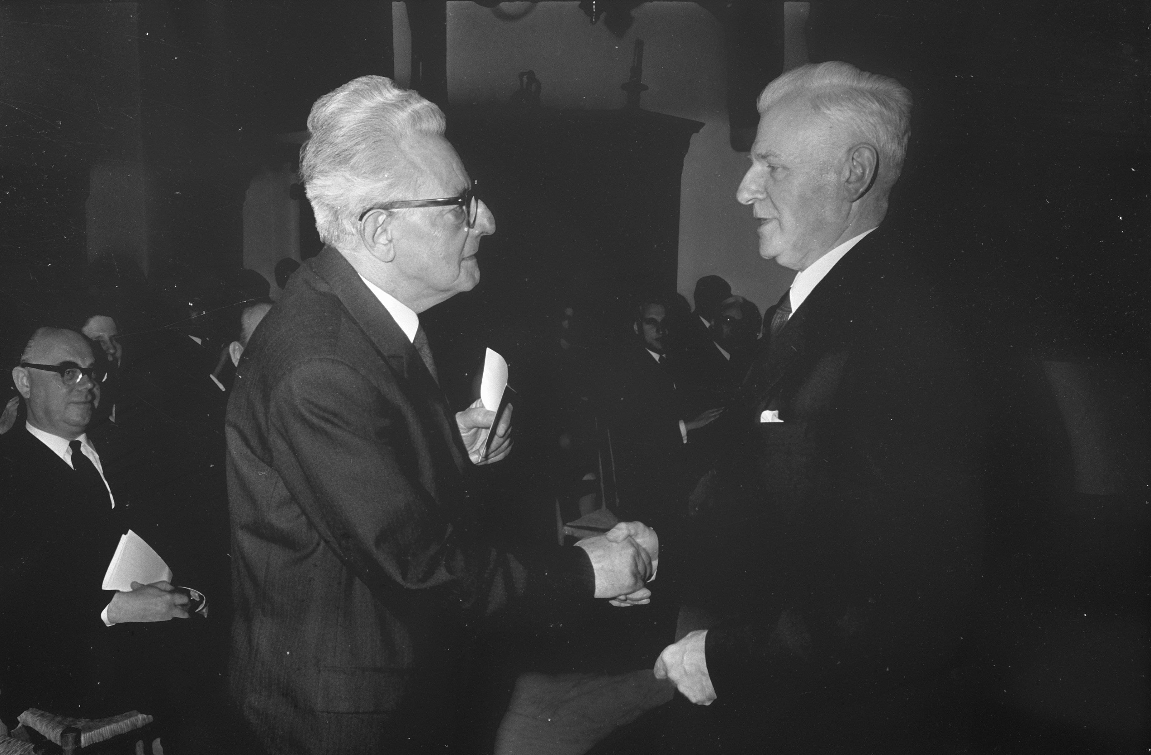 Uitreiking van de Bijzondere prijs voor zijn kritisch en essayistisch werk voor dhr. C.J.E. Dinaux (links) dr. P.J. Meertens reikt de prijs uit op Muiderslot in Ridderzaal (Nederland). 3 april 1968